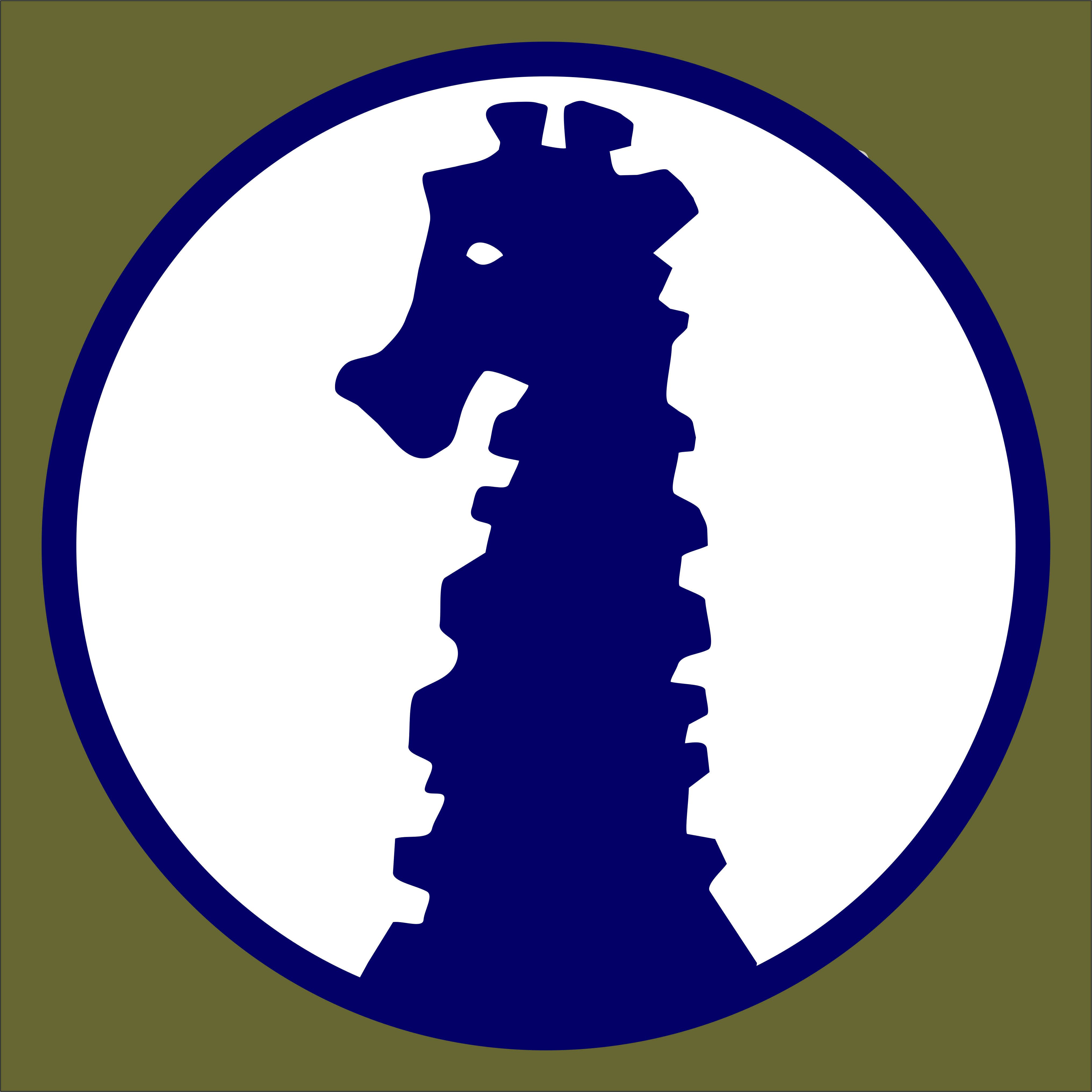 Godło na samolotach 1 eskadry dalekiego rozpoznania i bombardowania, Morskiego Dywizjonu Lotniczego stosowany w latach 1927 - 1932